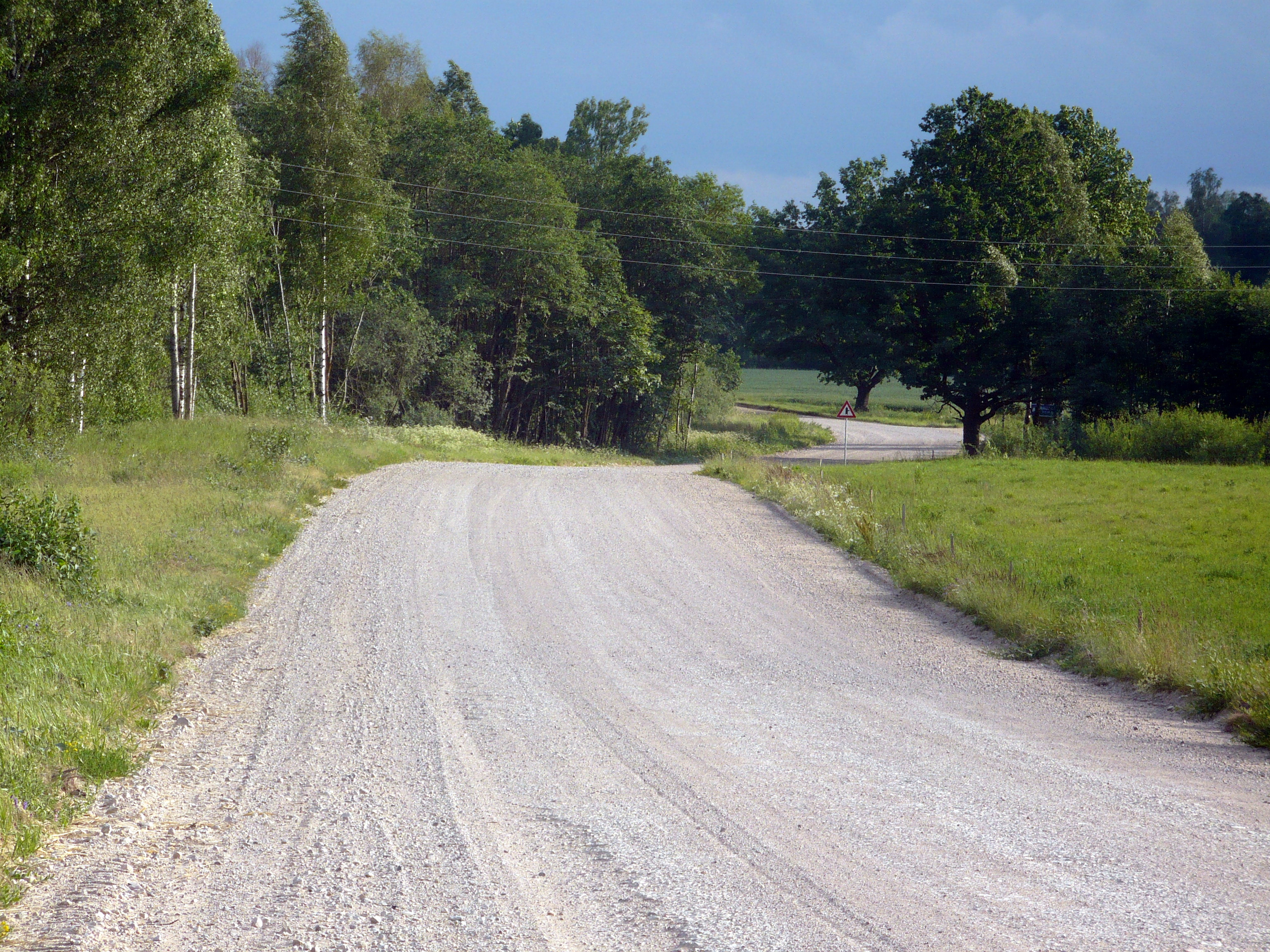 Autoceļš P87 Vecsaules pagastā